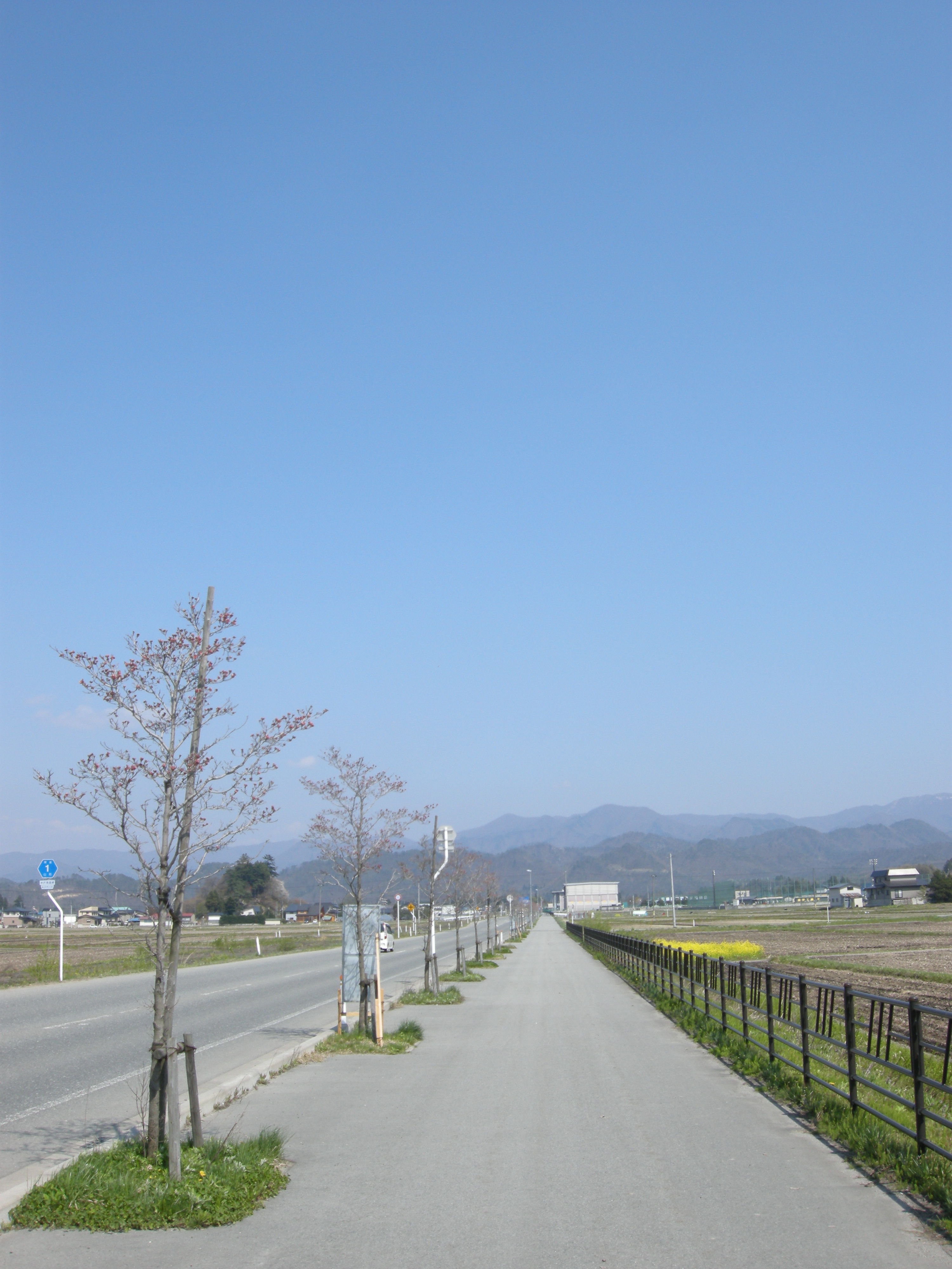 Road in Yonezawa, Yamagata